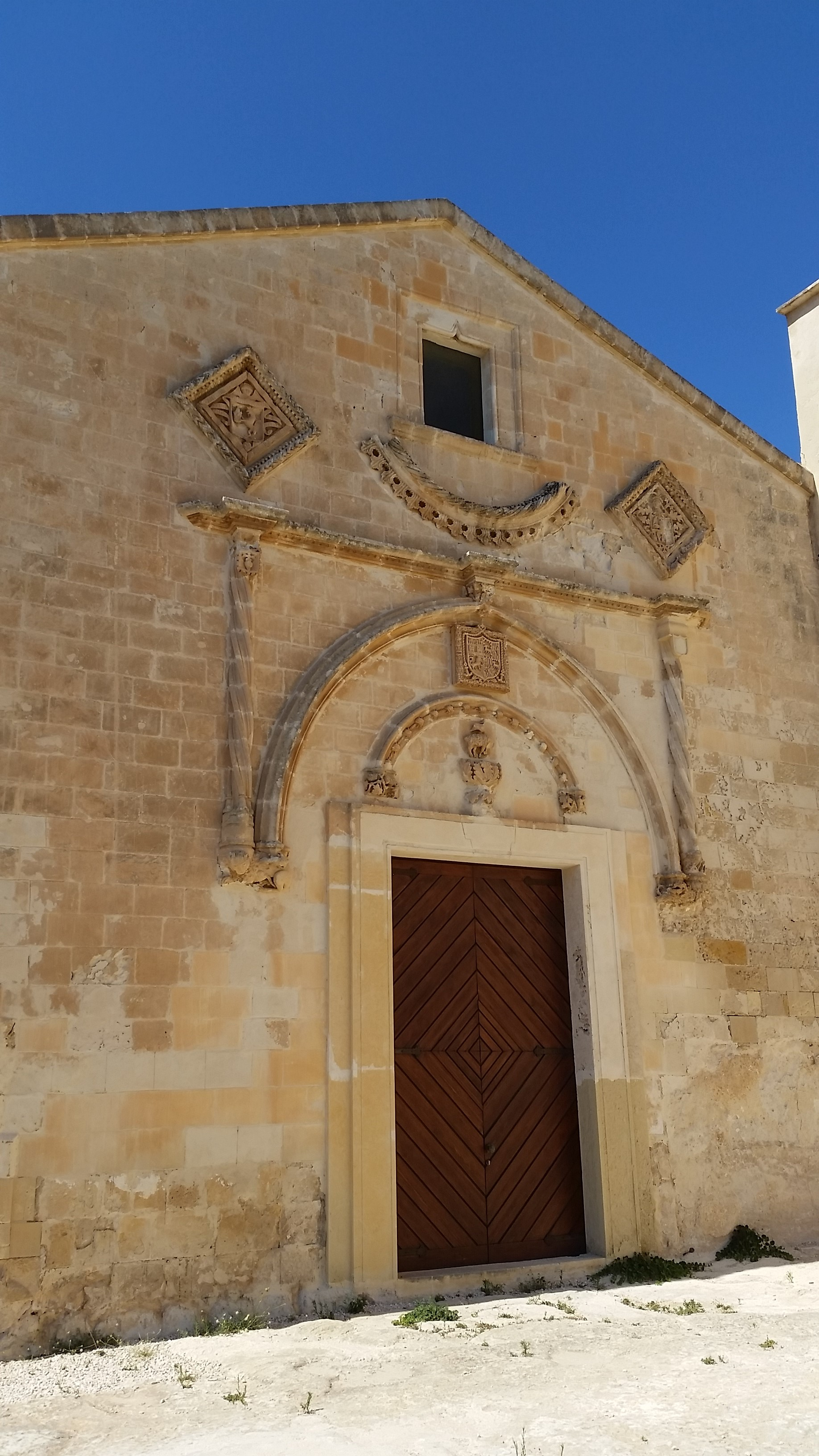 Chiesa di Santa Maria della Croce, Scicli, facciata